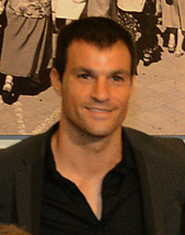 La presidenta Cristina Fernández recibe al plantel de Racing, ganador de la temporada.